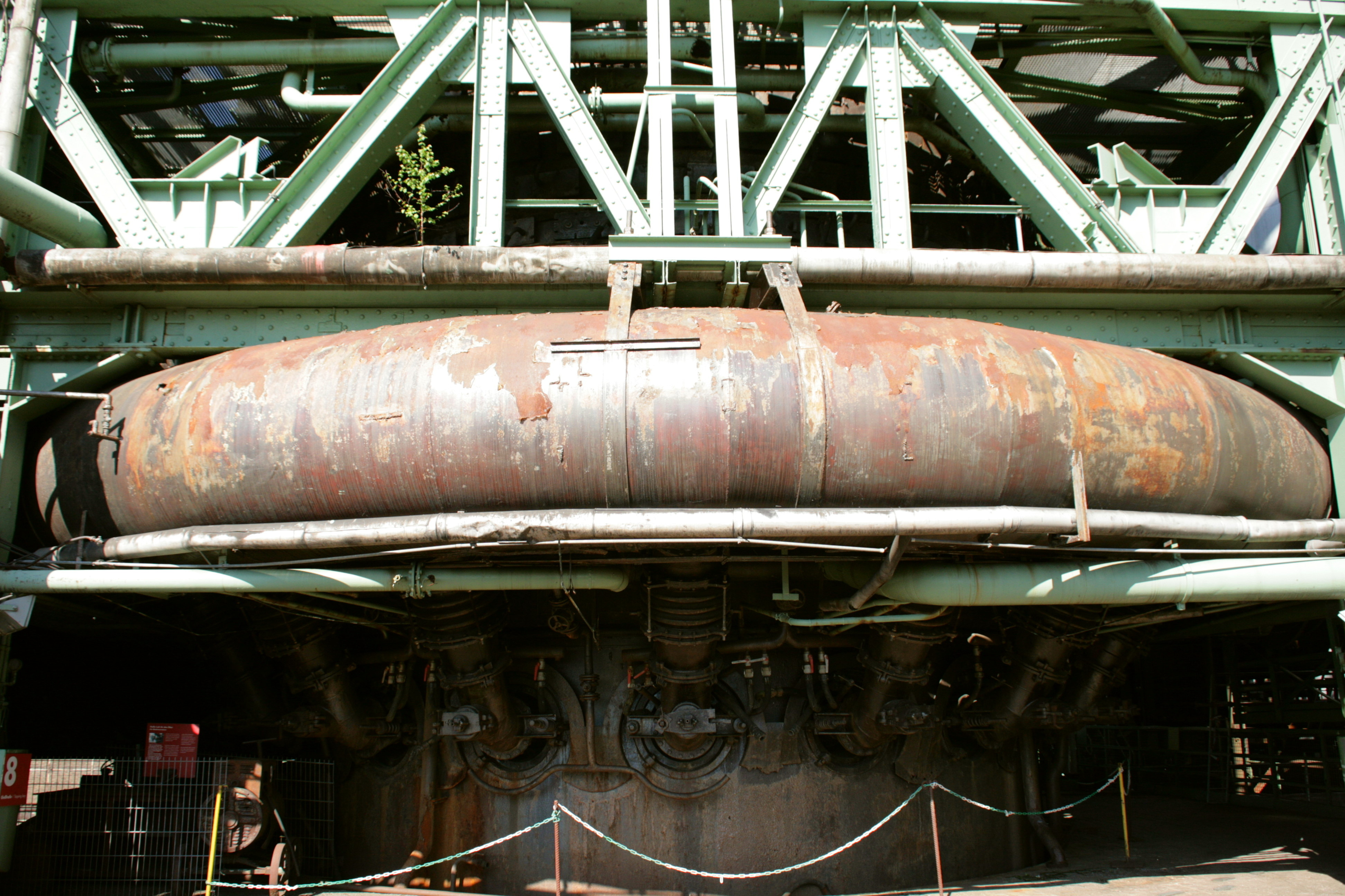 Hochofen 3 der Henrichshütte in Hattingen